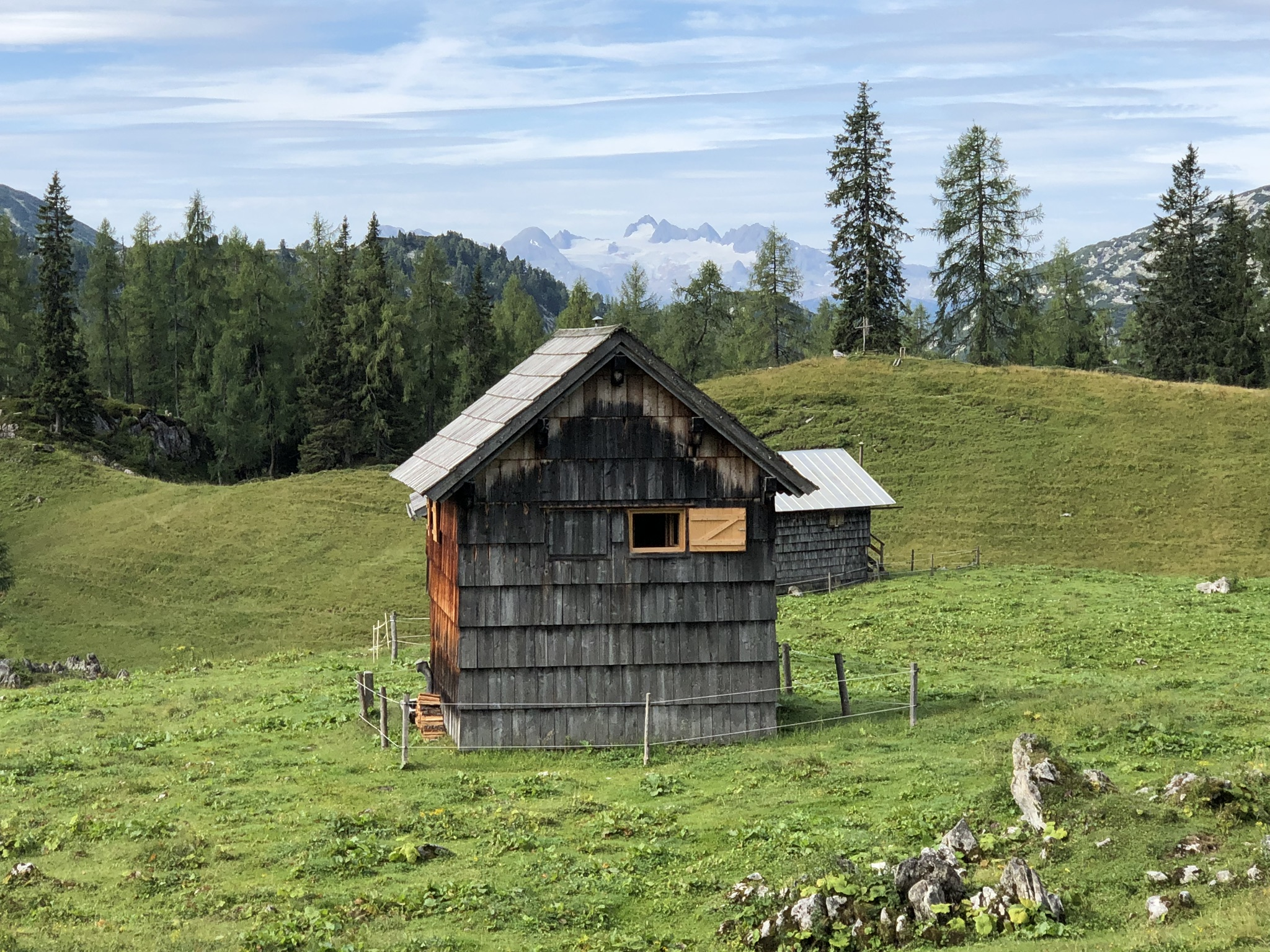 Almen, deren Hütten erbaut wurden zur Zeit der Monarchie. Im Hintergrund das Massiv des Dachsteins